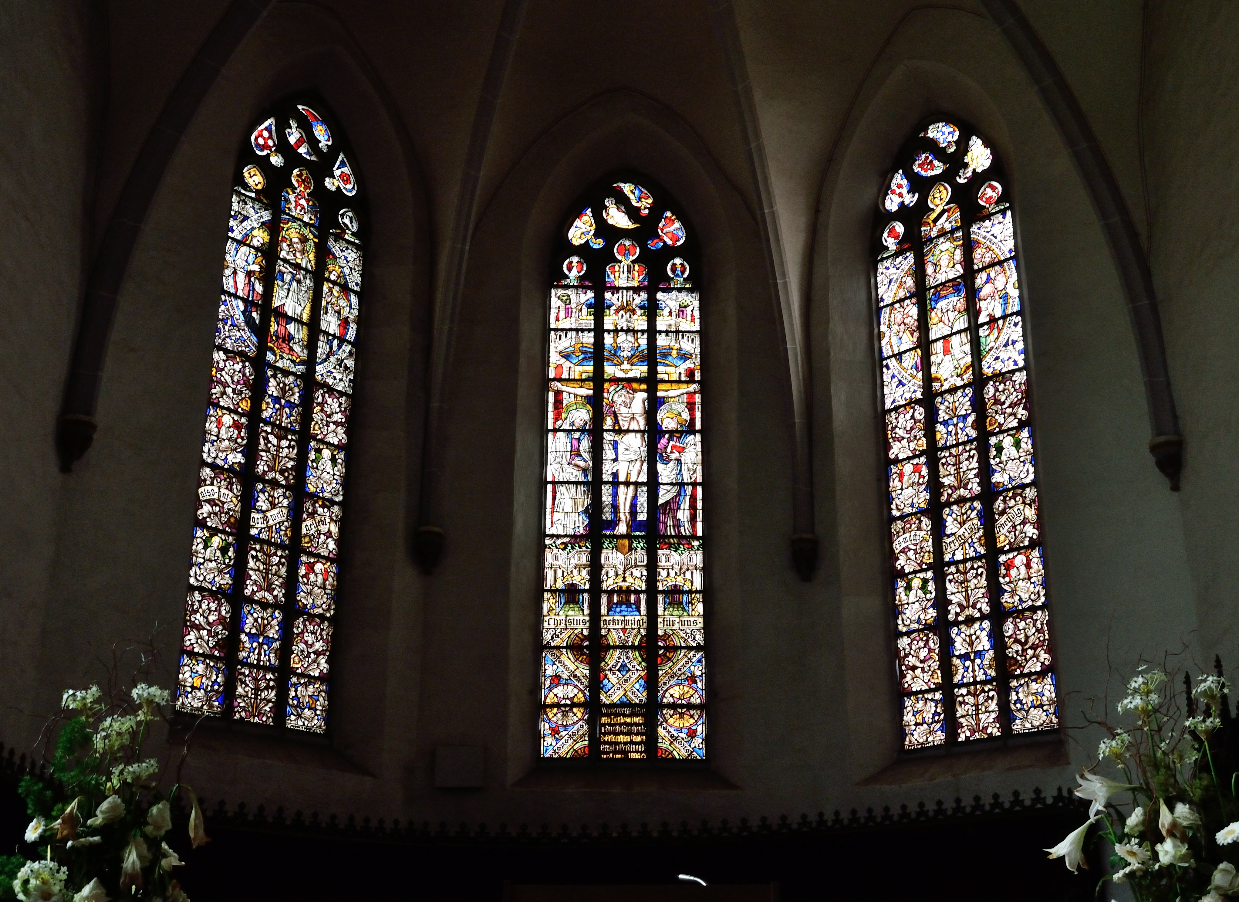 Inneres der evangelisch-reformierten Klosterkirche Falkenhagen, Chorfenster